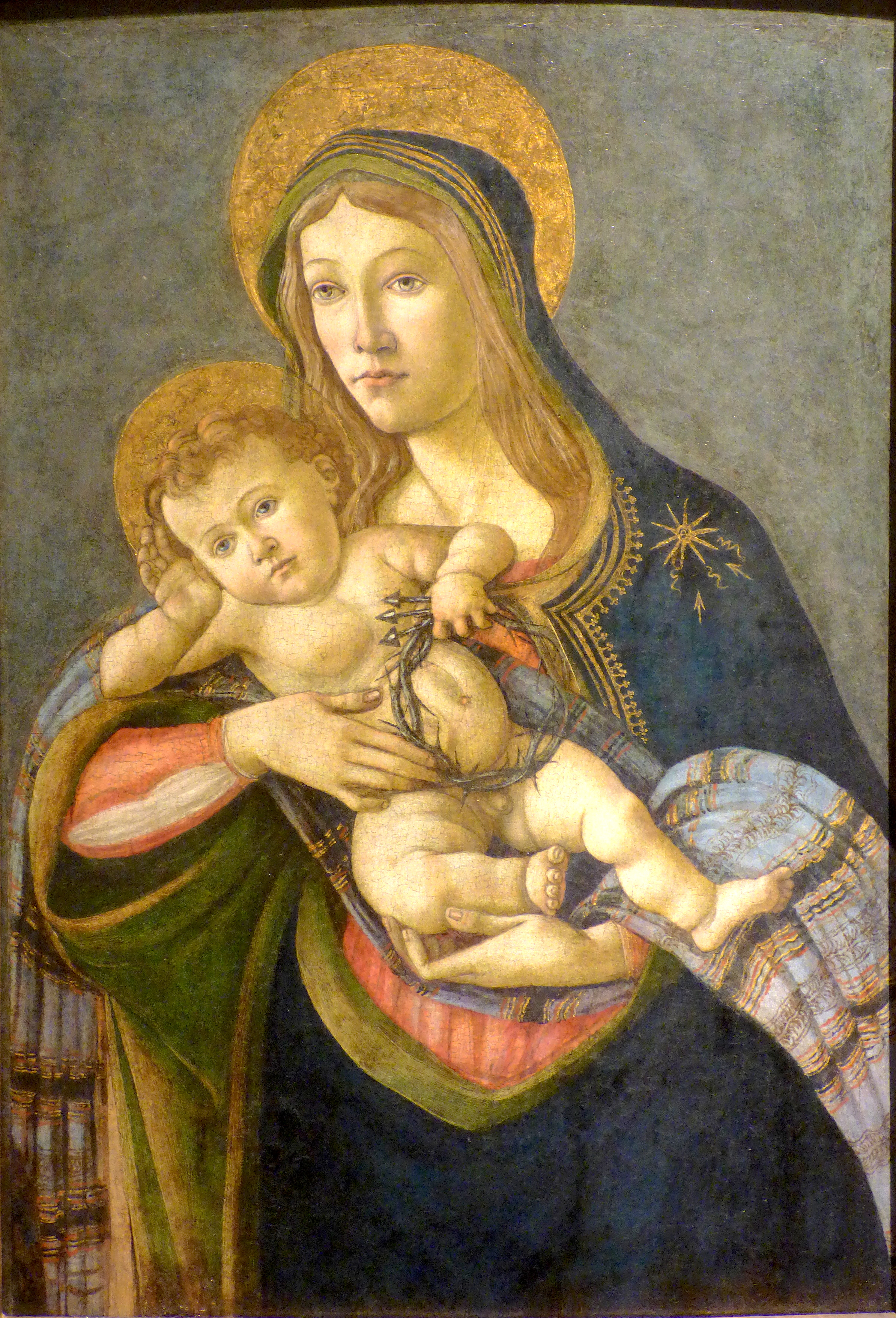 La Virgen y el Niño con la corona de espinas y tres clavos, ubicada en el Museo Soumaya.